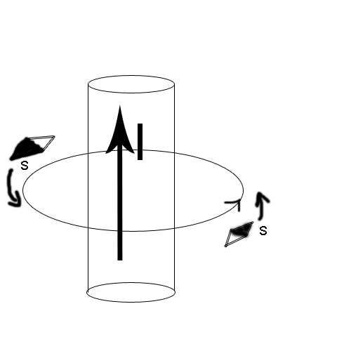 dokaz o existencii mag. pola v okoli vodica